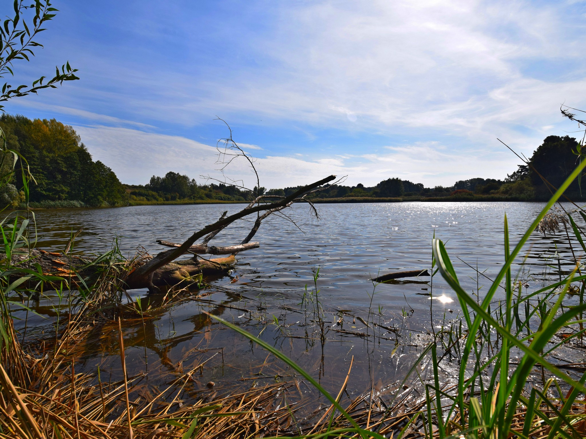 Obermühle, Frankfurt (Oder)-Booßen